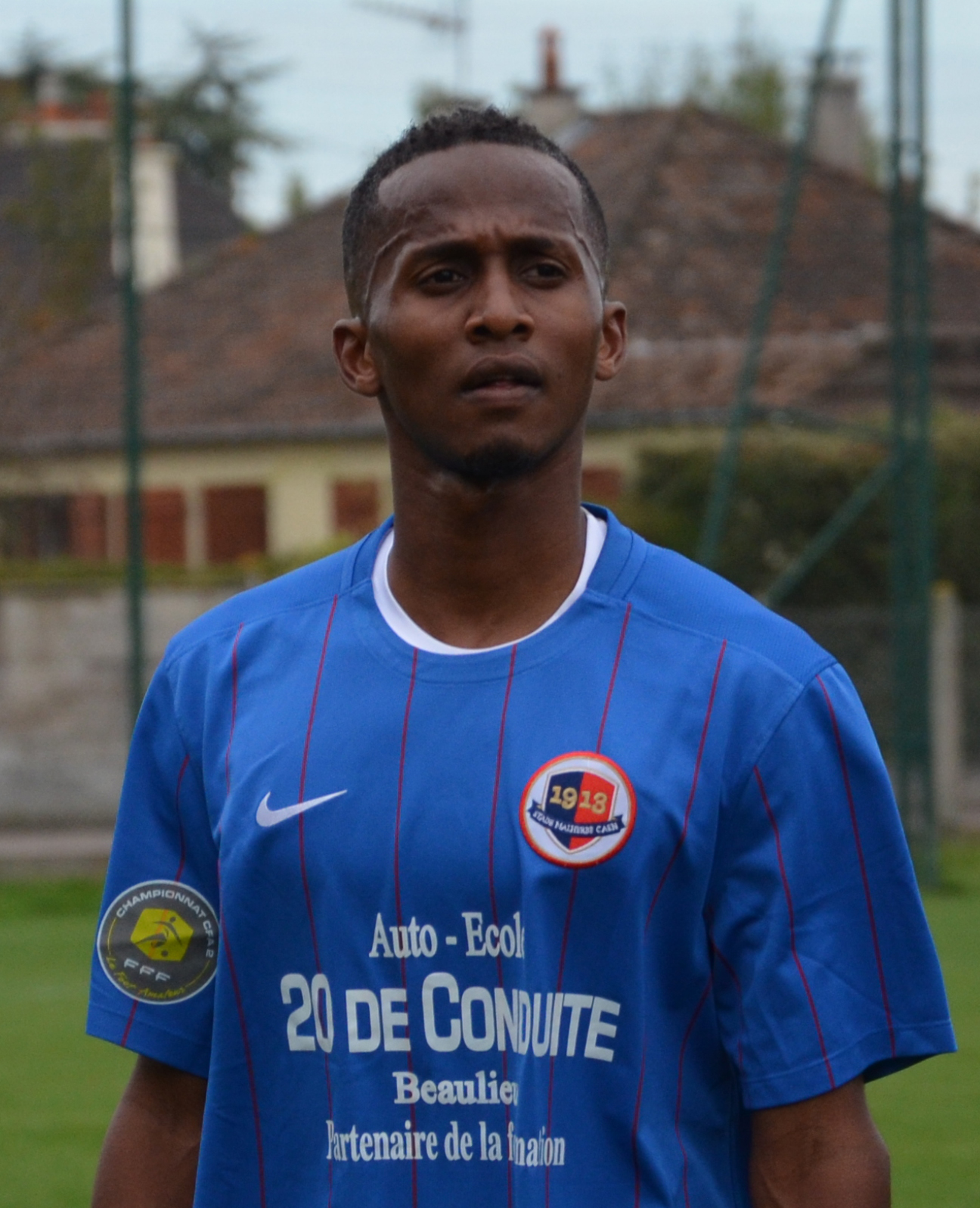 Photographie prise lors d'un match amical opposant les équipes réserves du Stade Malherbe de Caen et du Stade rennais sur l'un des terrains annexes du stade de Venoix le 13 septembre 2015. Ici, Chaker Alhadhur.